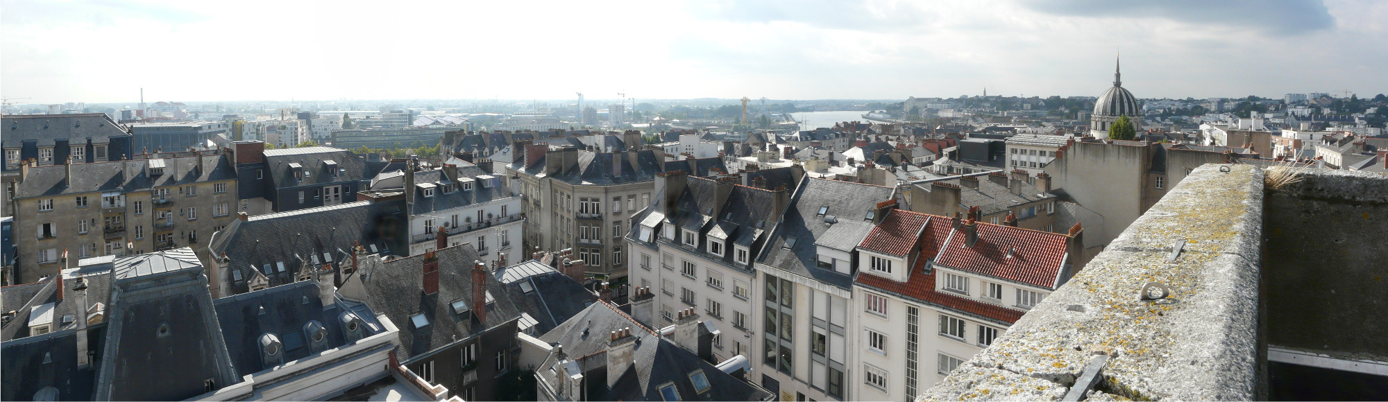 Ancien observatoire de la Marine - Nantes - Depuis la terrasse de l'ancien observatoire astronomique de la Marine vue panoramique vers le Sud / Sud-Ouest .